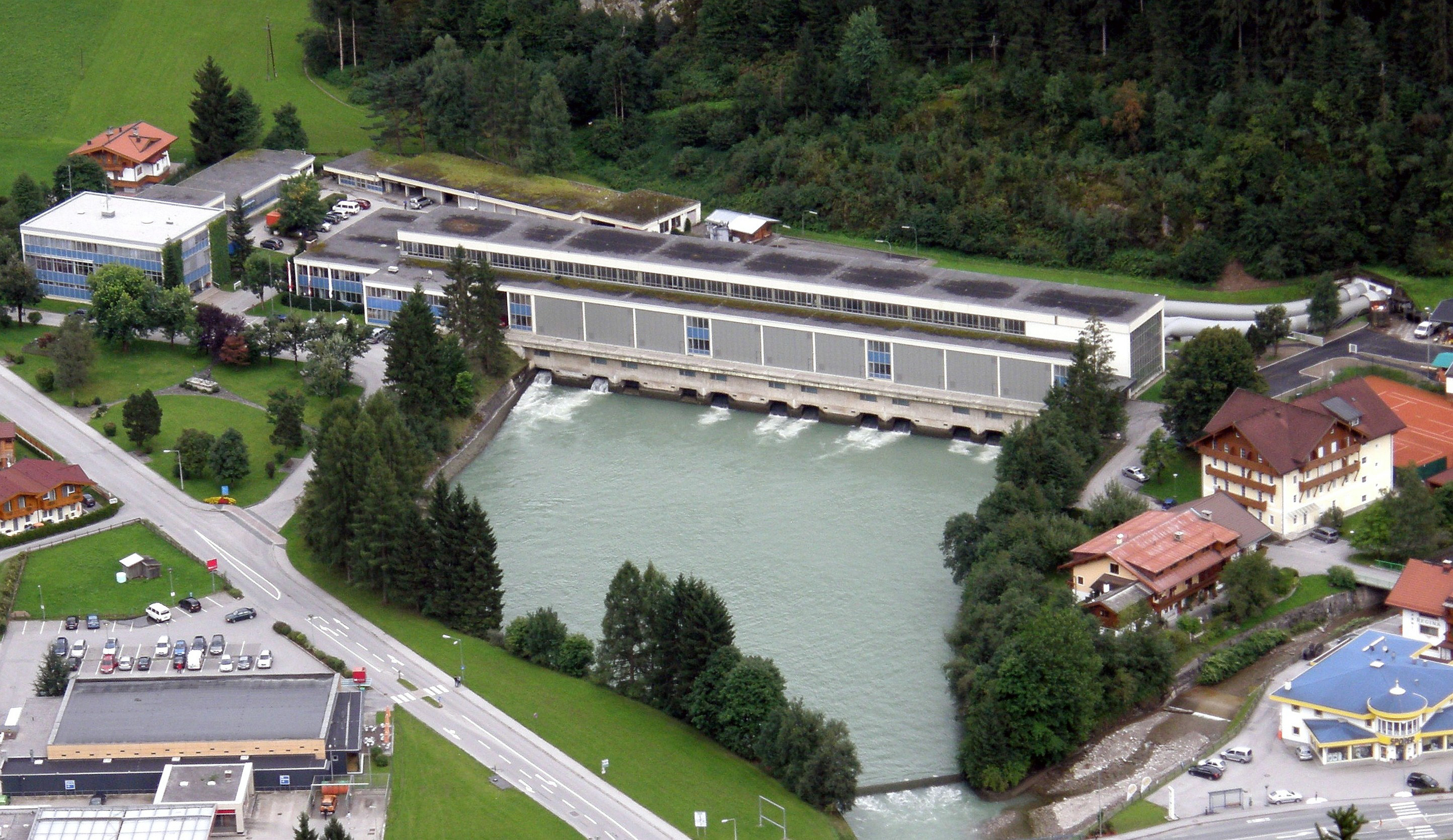 Kraftwerk Mayrhofen (Tirol, Österreich)